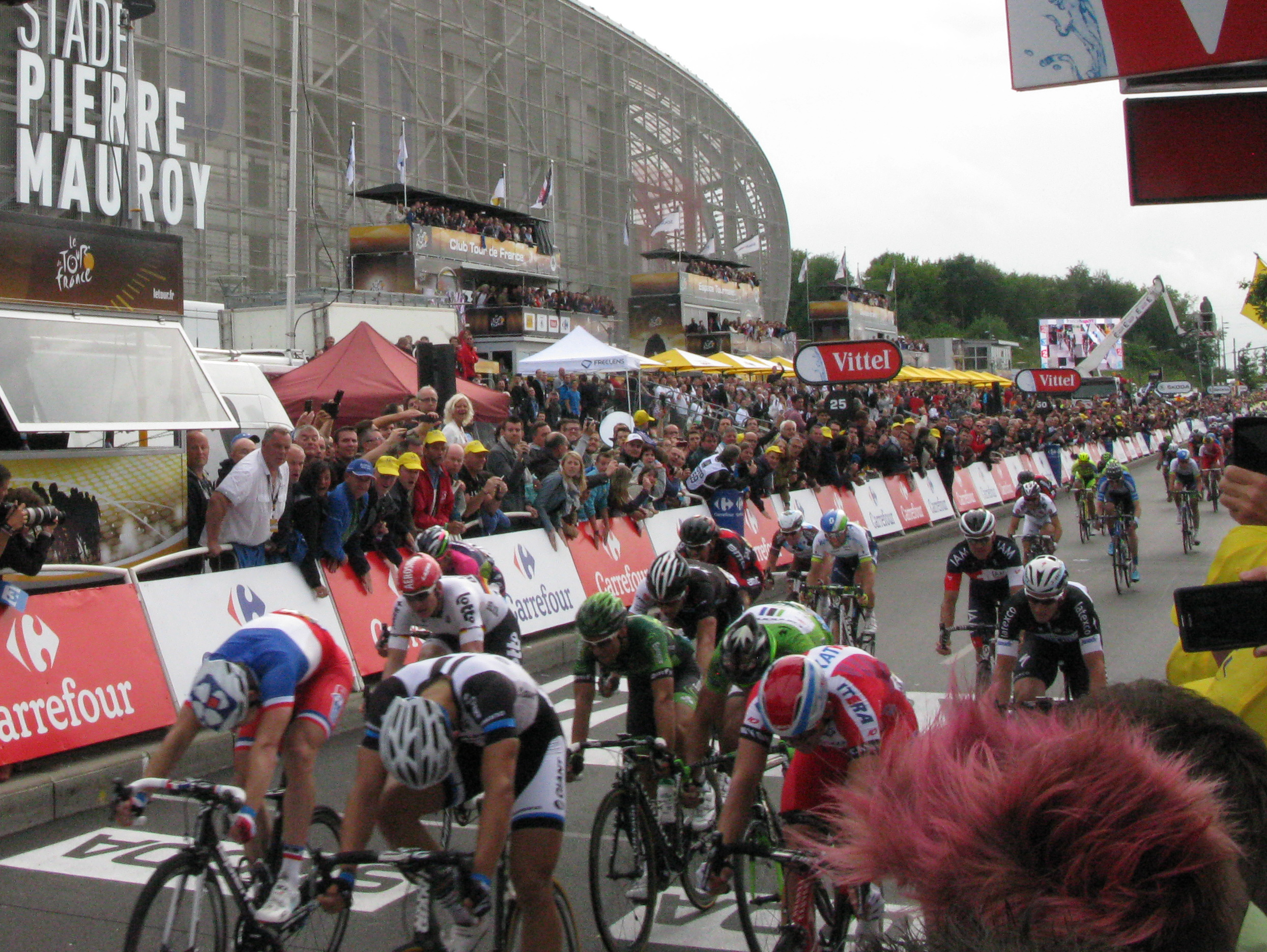 De g. à d., au 1er rang, Arnaud Demare, Marcel Kittel, Alexander Kristoff. Au 2e rang, André Greipel, Bryan Coquard, Peter Sagan. Au 3e rang, Davide Cimolai, Danny Van Poppel, Mark Renshaw. Au 4e rang, Heinrich Haussler, Samuel Dumoulin, Michael Albasini, Daniel Oss. Arrivée de la 4e étape du Tour de France 2014 à Villeneuve-d'Ascq.